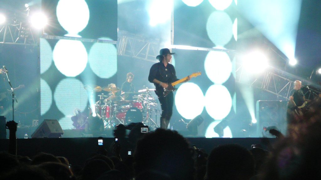 Soda Stereo en Caracas. Gustavo Cerati con sombrero.